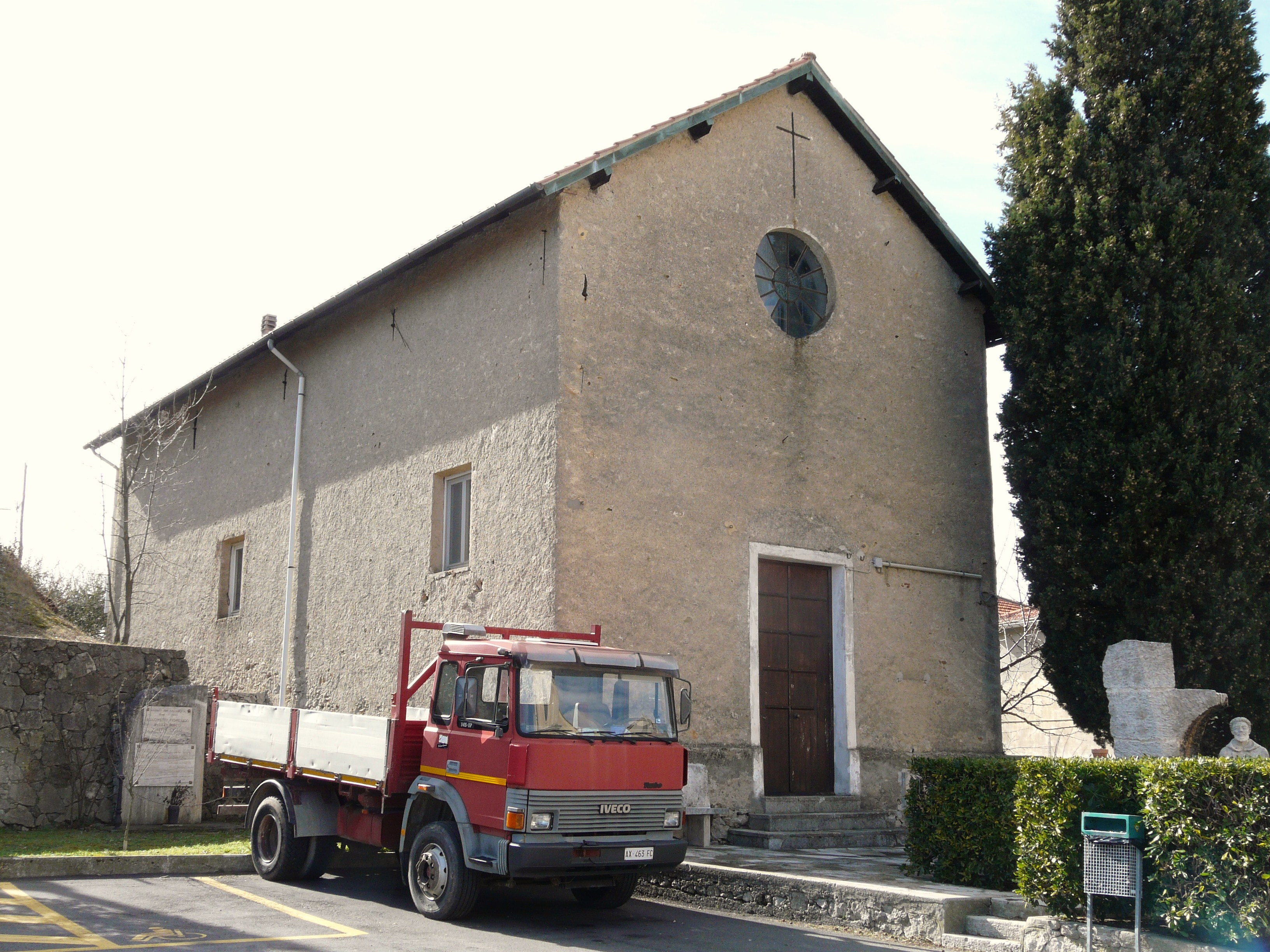 Oratorio della chiesa di San Lorenzo di Orco, Orco Feglino, Liguria, Italia